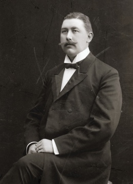 Johan Petter Andersson, senare Johan Petter Åhlén